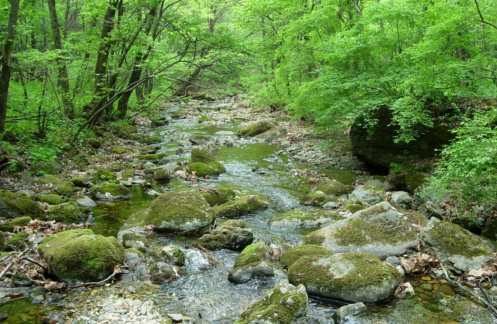 关门山内小溪